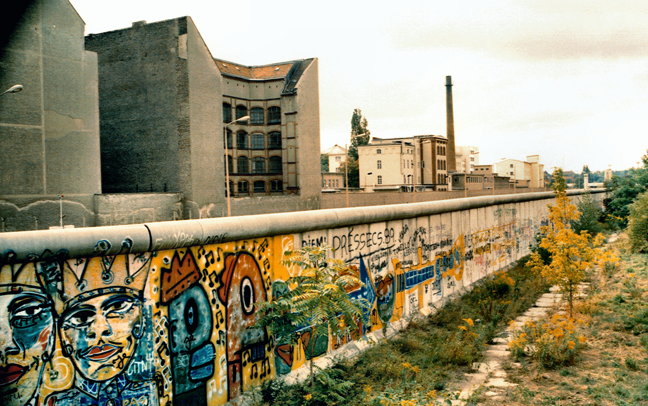 Ein Blick von der Chaussee- in die Boyenstraße im Juni 1989. Der Fotograf befindet sich in West-Berlin. Die abgebildeten Gebäude gehören zu Ost-Berlin.